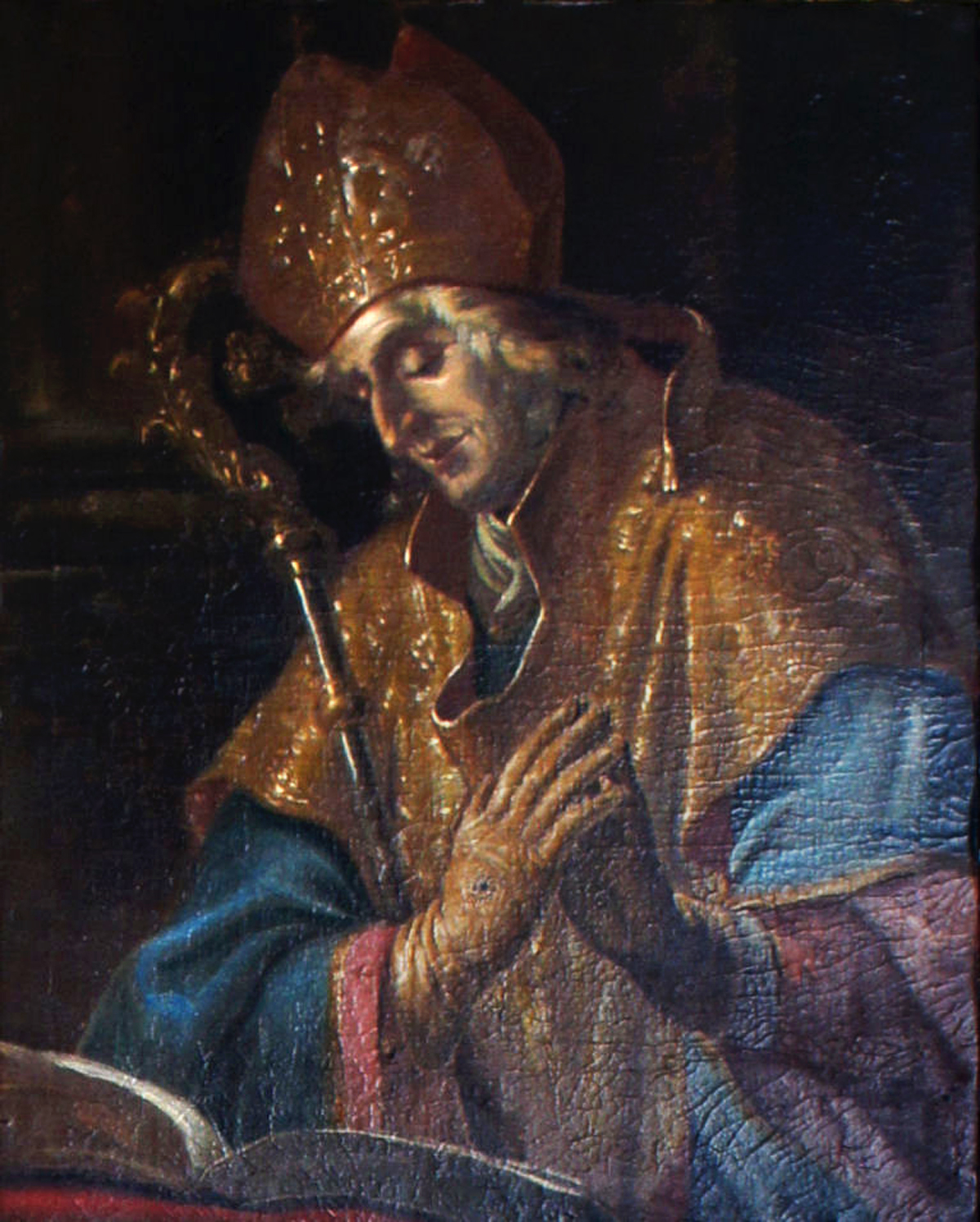 Porträtgemälde von Johannes II. Hake, Fürstbischof von Freising, im Fürstengang zwischen Fürstbischöflicher Residenz und Freisinger Dom.